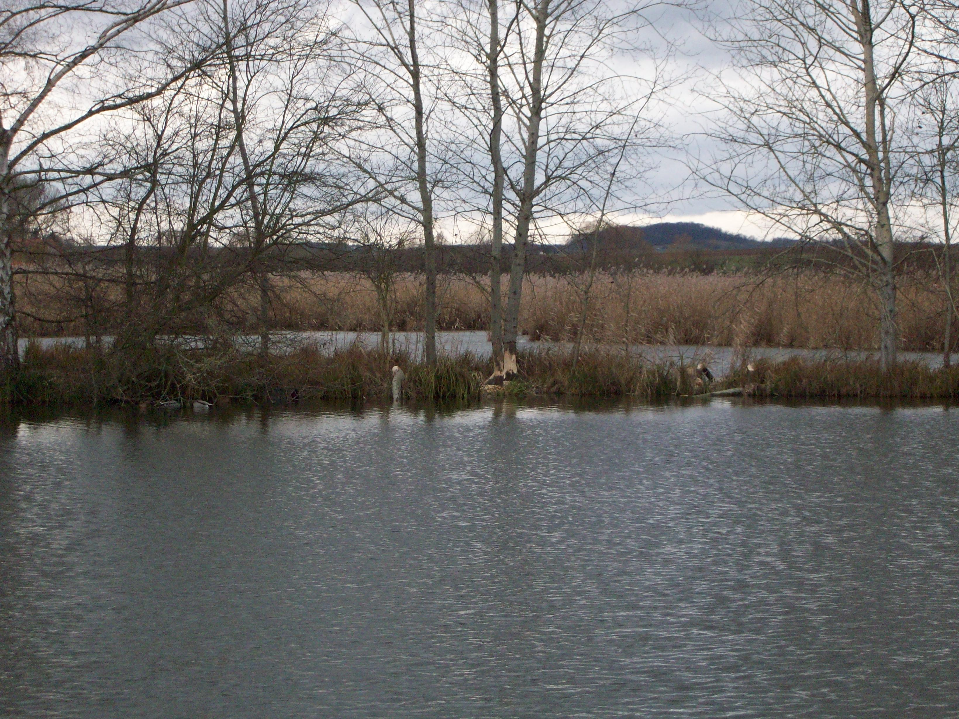 Der Biber ist zurück an den Reinheimer Teichen